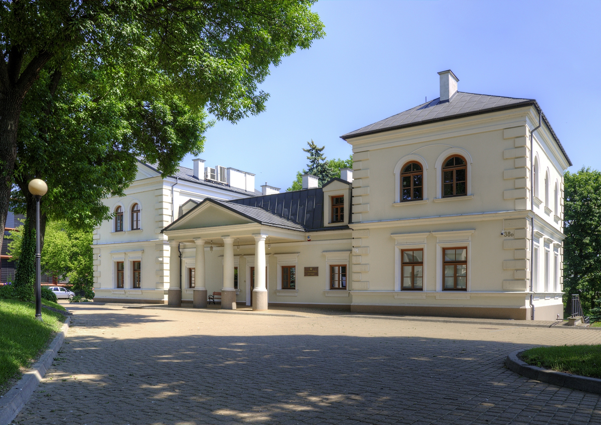 Front budynku Rektoratu Politechniki Lubelskiej